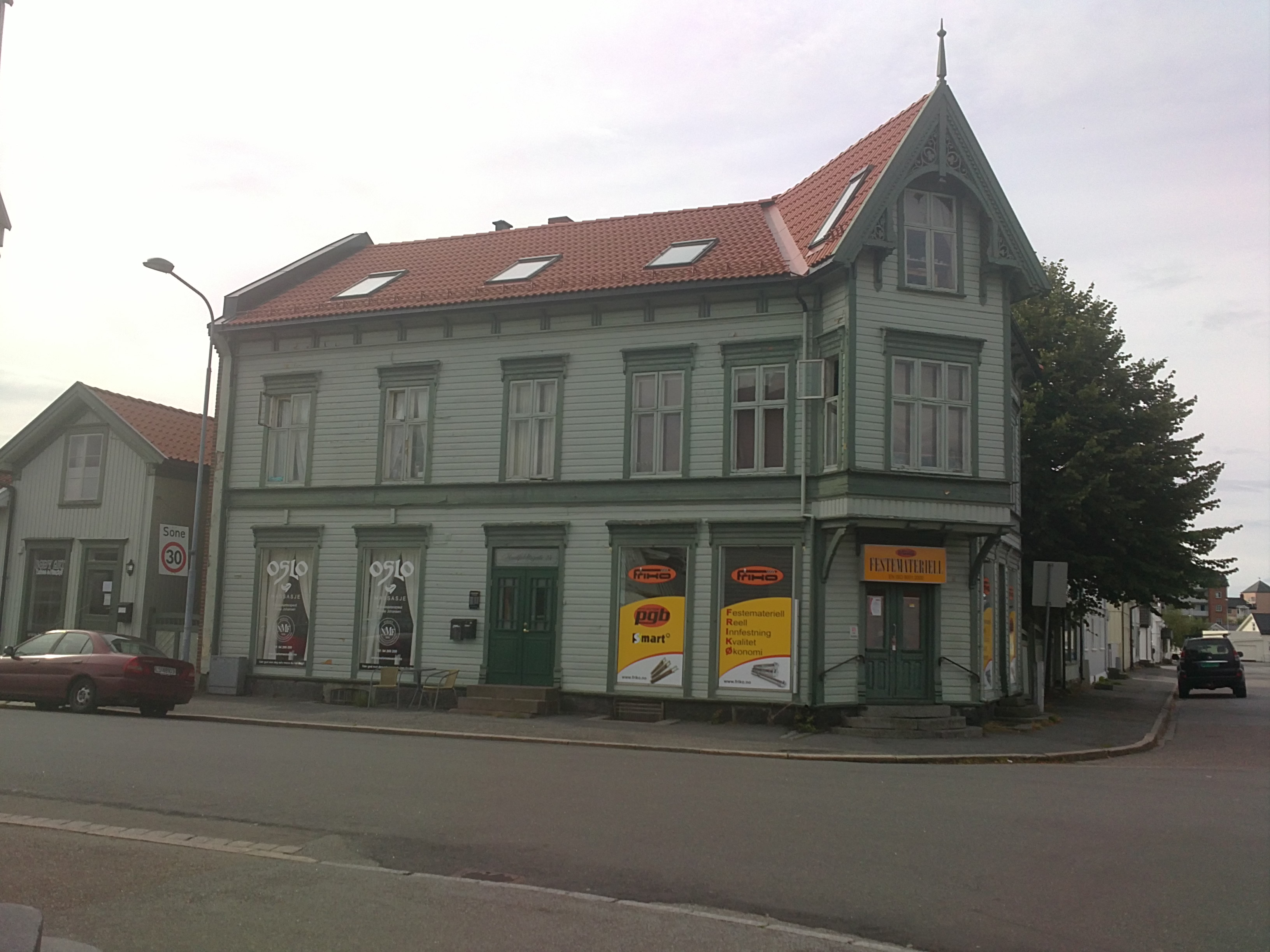 Bilde av tidligere A.C. Hansens gård, Torstrand